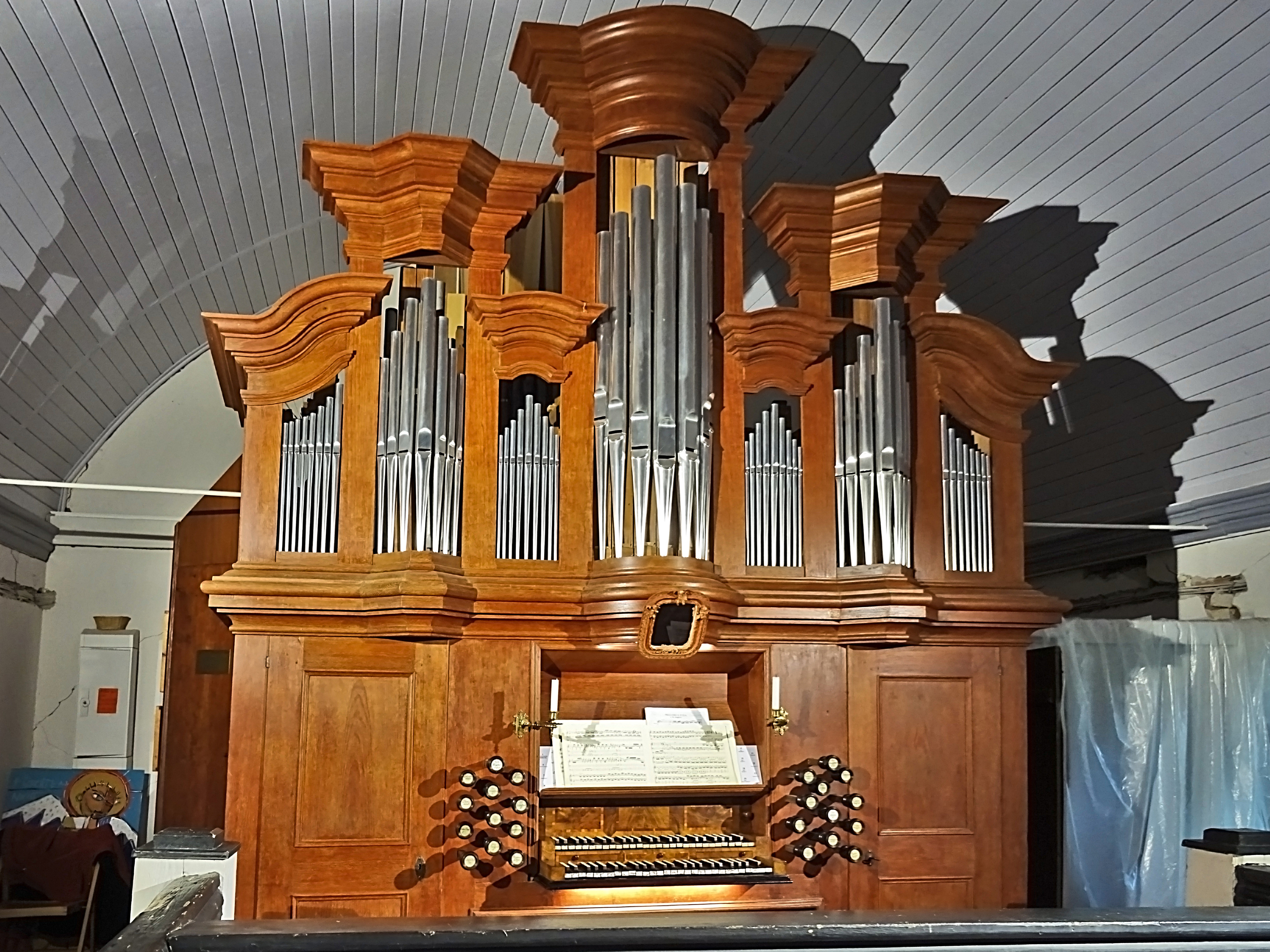 Orgel von Johann Michael Hesse (1798, II/P 19) in der Dreifaltigkeitskirche Holzhausen